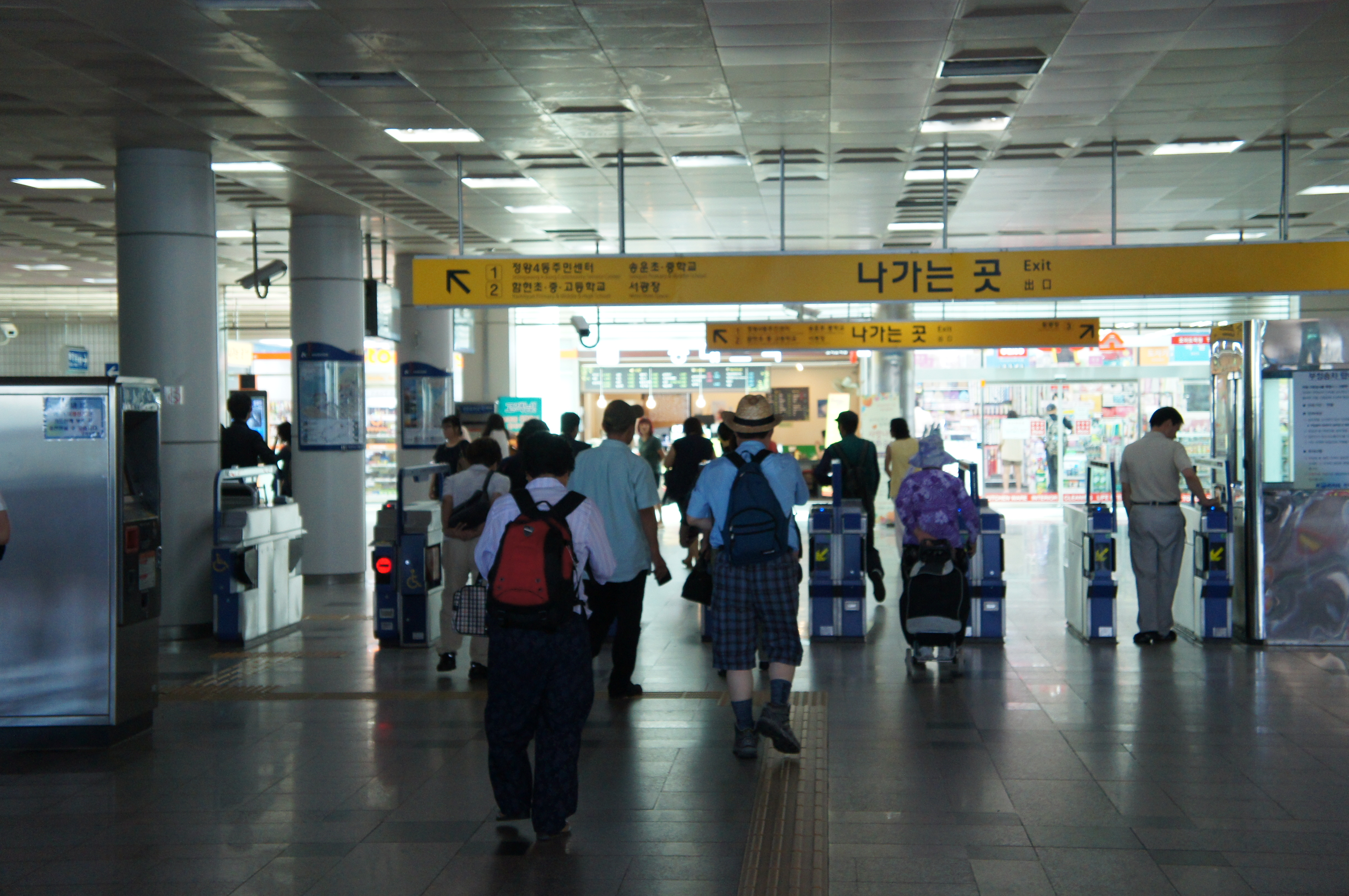 오이도역 대합실